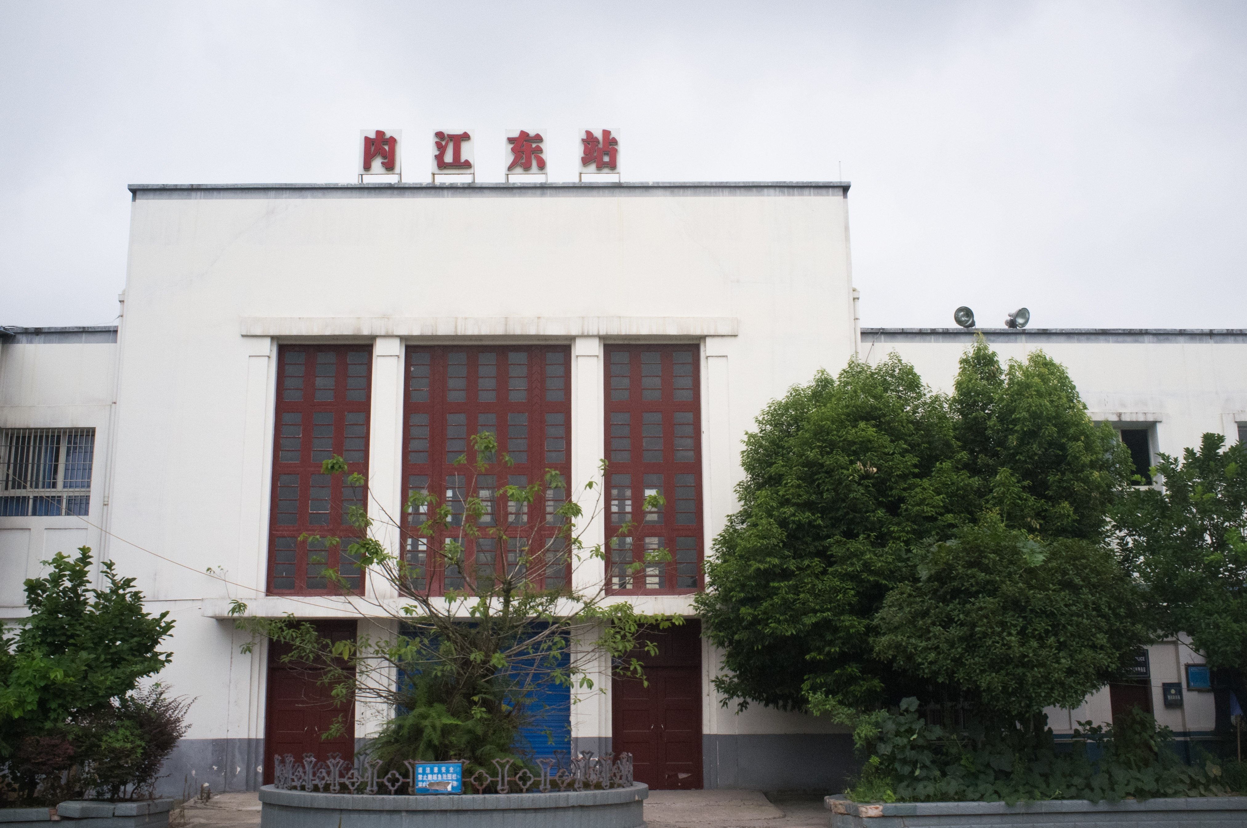 中文（中国大陆）: 成渝铁路内江东站